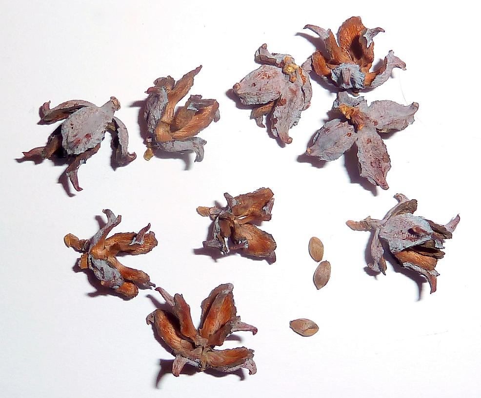 Platycladus orientalis (Árbol de la vida) - Conos femeninos maduros abiertos y semillas sueltas - Cultivado/ornamental, Madrid (España).